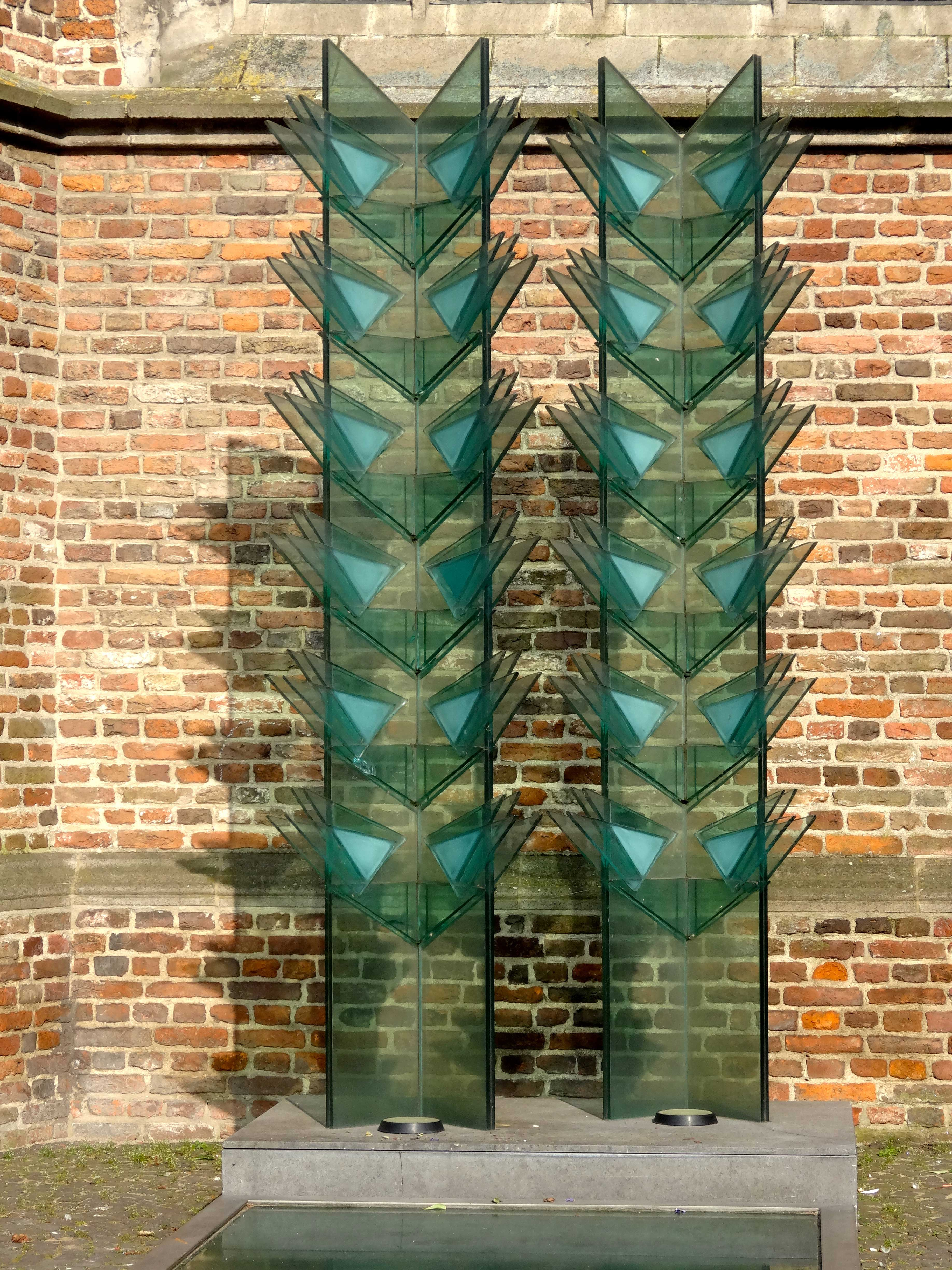 Vredesmonument door Jan Wolkers bij de Grote- of Martinikerk in Doesburg